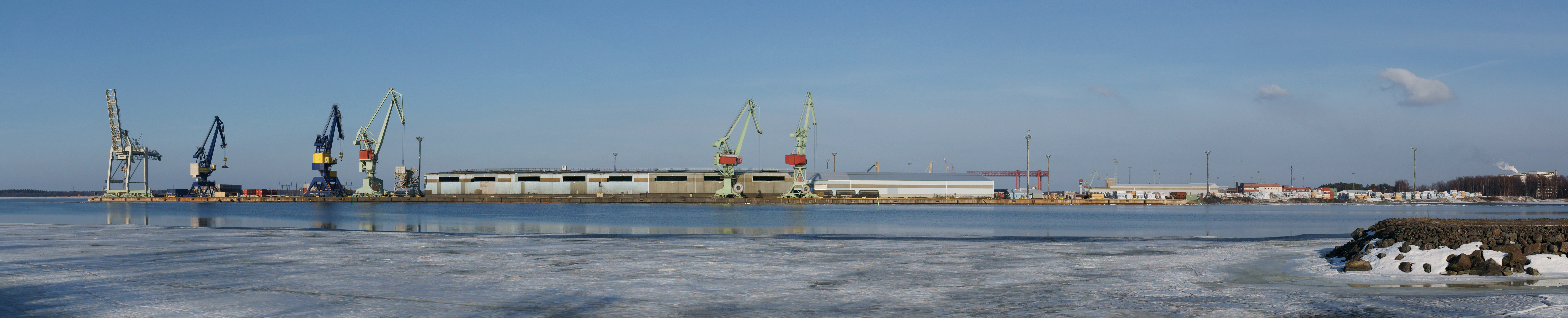 Panoraamakuva Mäntyluodon satamasta. Kuva otettu Kallosta.